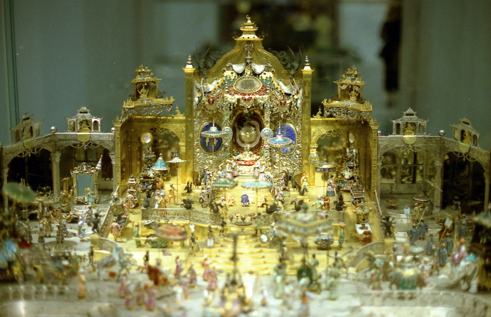 Hofstaat zu Delhi am Geburtstag des Großmoguls Aurangzeb, Johann Melchior Dinglinger (1701 bis 1708)